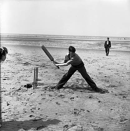 Teitl Cymraeg/Welsh title: Trip Ysgol Sul Eglwys Stryd Beatrice, Croesoswallt, i'r Rhyl. Ffotograffydd/Photographer: Geoff Charles (1909-2002) Dyddiad/Date: 20/07/1955 Cyfrwng/Medium: Negydd ffilm / Film negative Cyfeiriad/Reference: (gch12868) Rhif cofnod / Record no.: 3368832 Rhagor o wybodaeth am gasgliad Geoff Charles yn Llyfrgell Genedlaethol Cymru More information about the Geoff Charles Collection at the National Library of Wales Mae ffotograffau Geoff Charles hefyd yn rhan o Broject Europeana Libraries Geoff Charles' photographs also form part of the Europeana Libraries Project